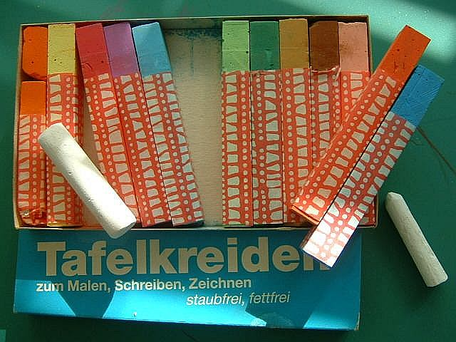 selbst fotografiert am 22.9.04, pd, gnu-fdl, Bild: Farbige Tafelkreiden Lizenz